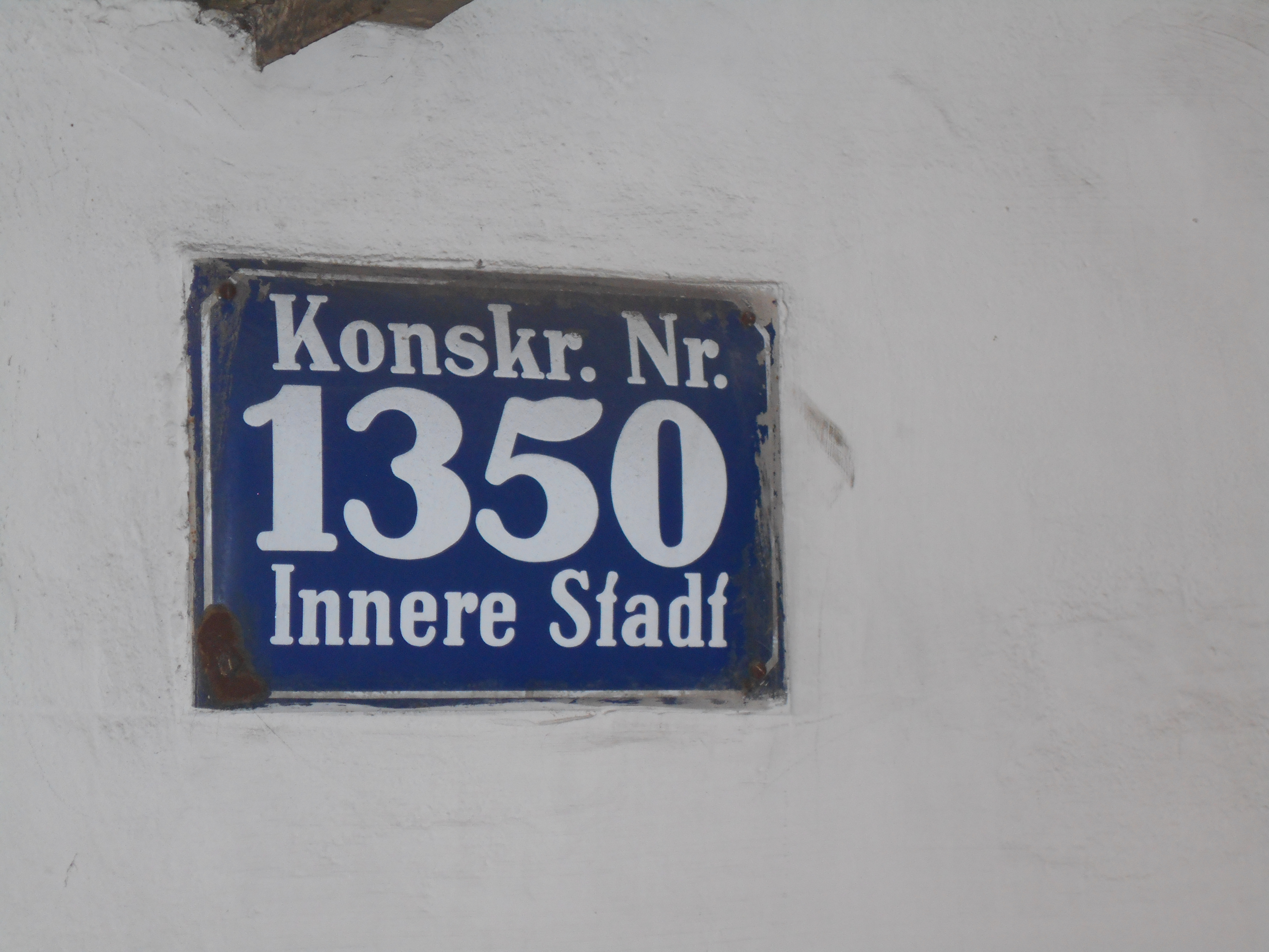 Konskriptionsnummernschild aus den 1950er-Jahren im Haus Walfischgasse 6